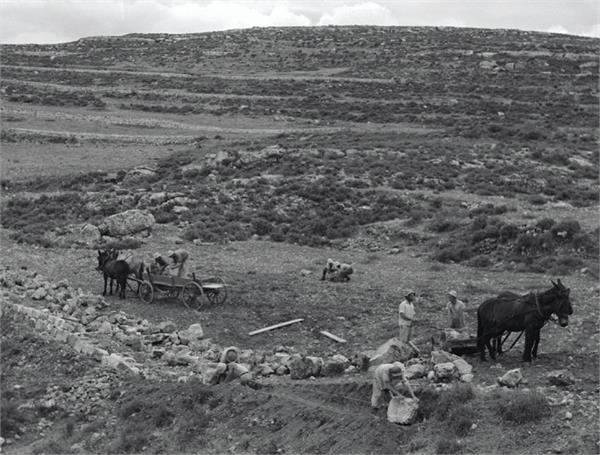 משואות יצחק - בנית טרסות, הכנה לנטיעות עצי פרי.